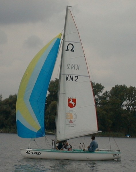 Łódź klasy Omega (regatowa) ze spinakerem. Zdjęcie własne.